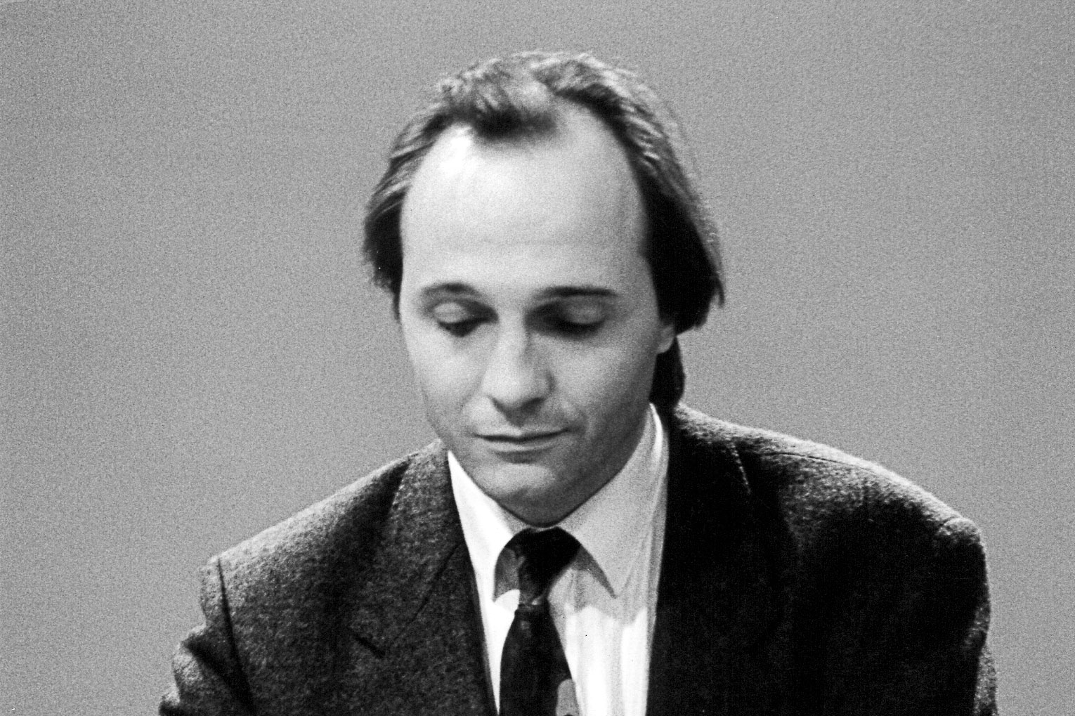 Christian Favre en concert avril 1992